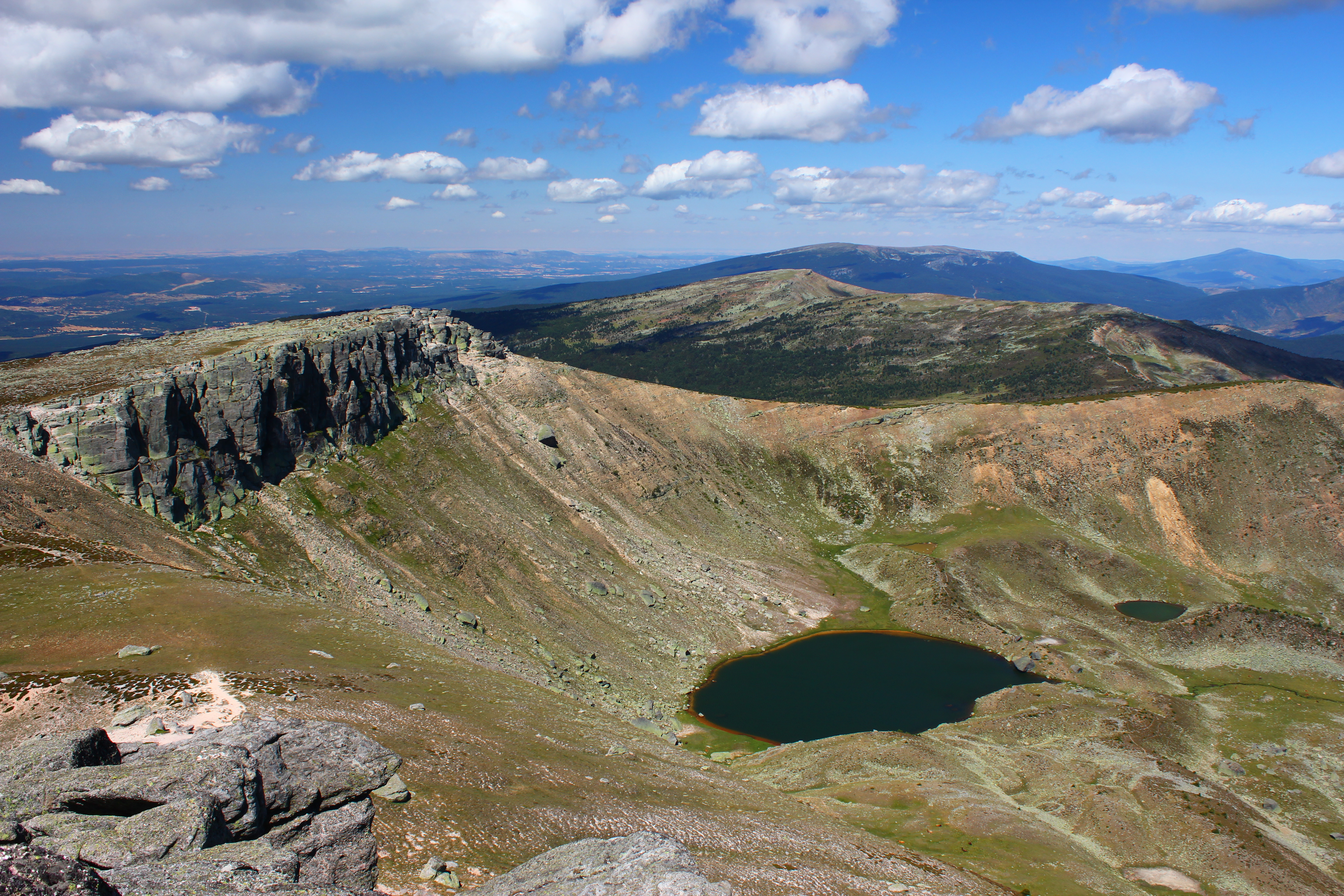 Sierras de Demanda, Urbión, Cebollera y Cameros This is a photography of a Special Area of Conservation in Spain with the ID: ES0000067. Natura2000 entry, EEA entry